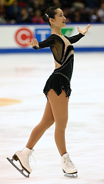 Shizuka Arakawa competes at 2003 Skate Canada in Mississauga, Ontario.